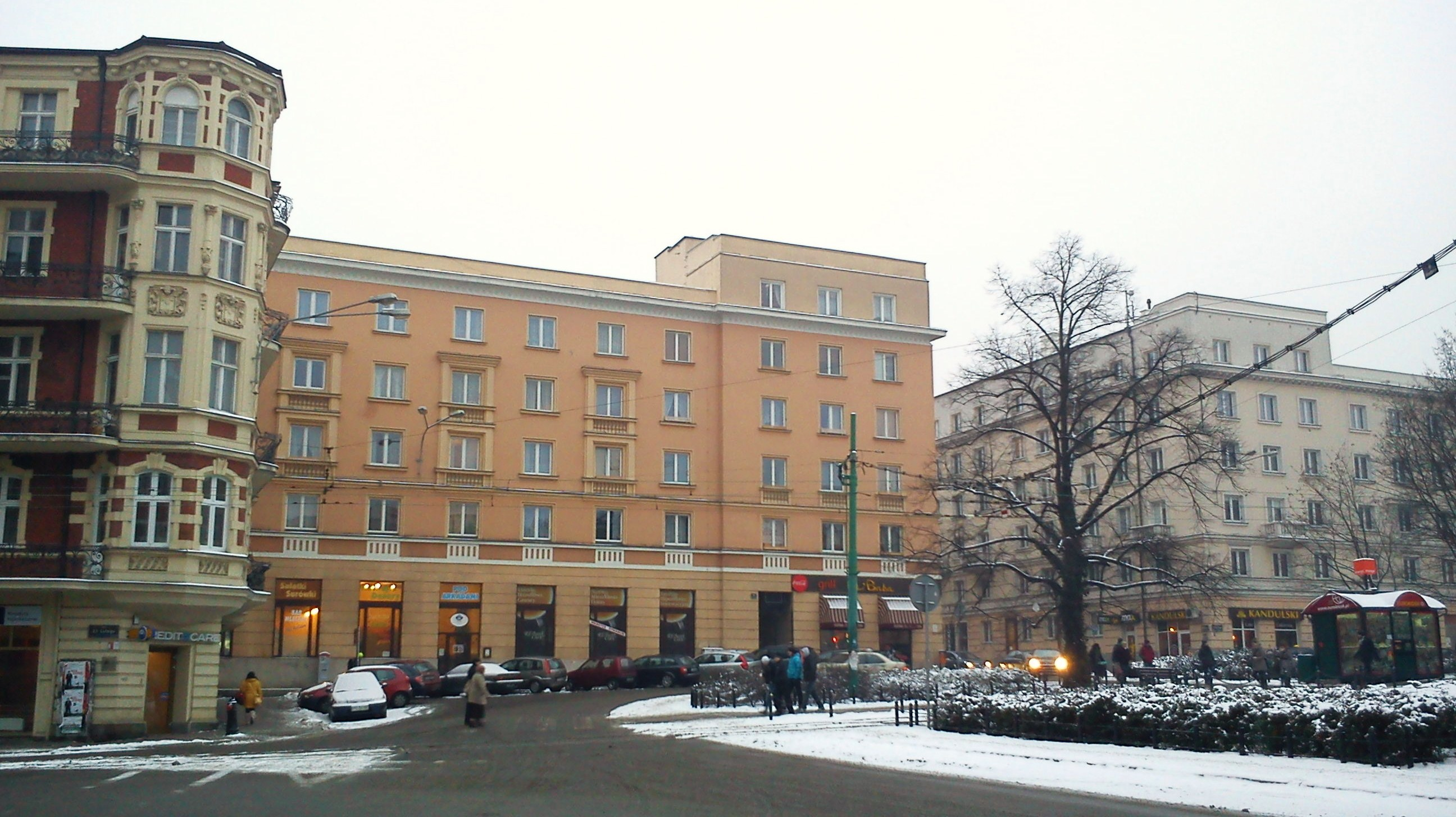 plac Cyryla Ratajskiego, Poznań.